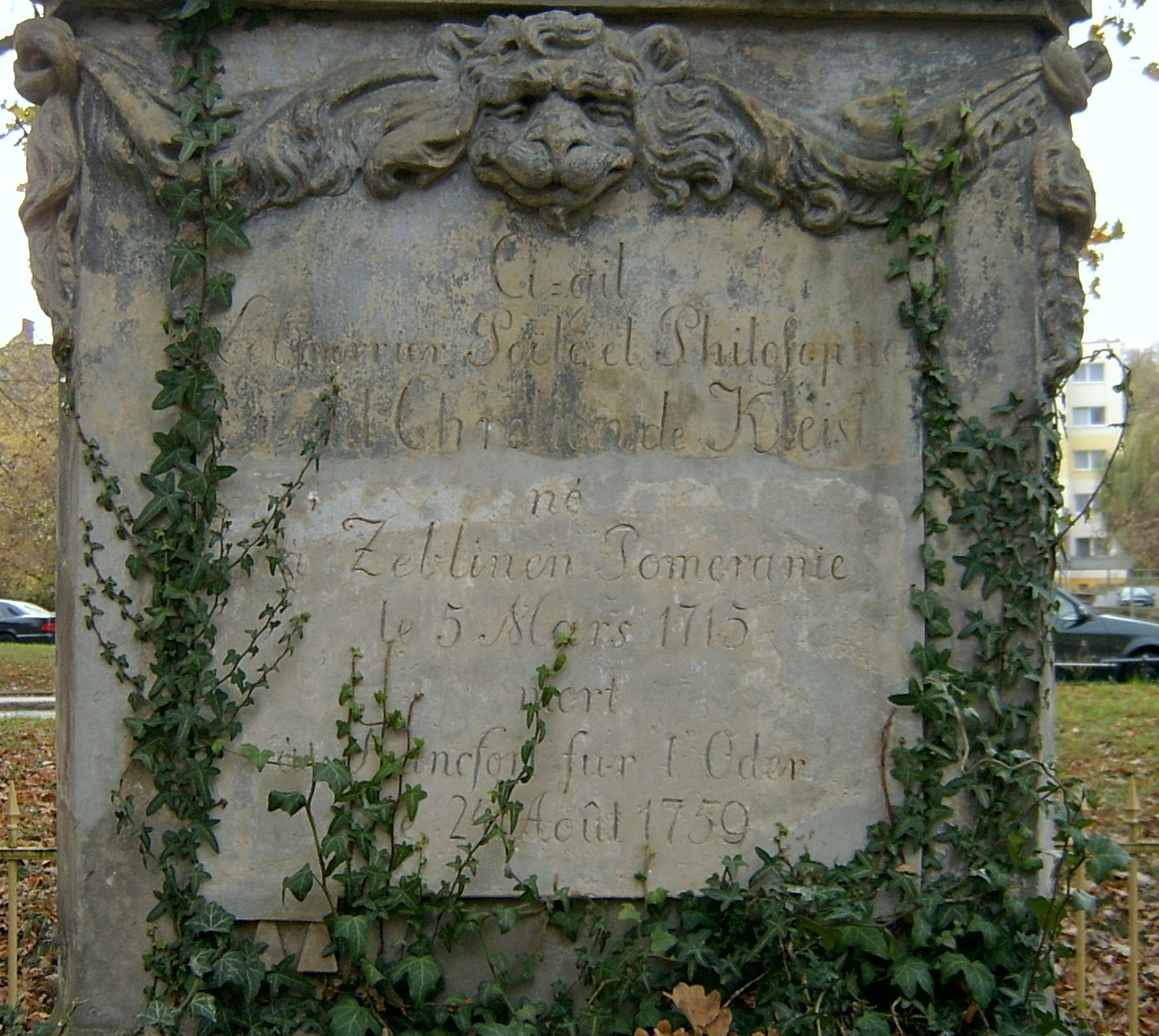 Denkmal Ewald Christian von Kleists